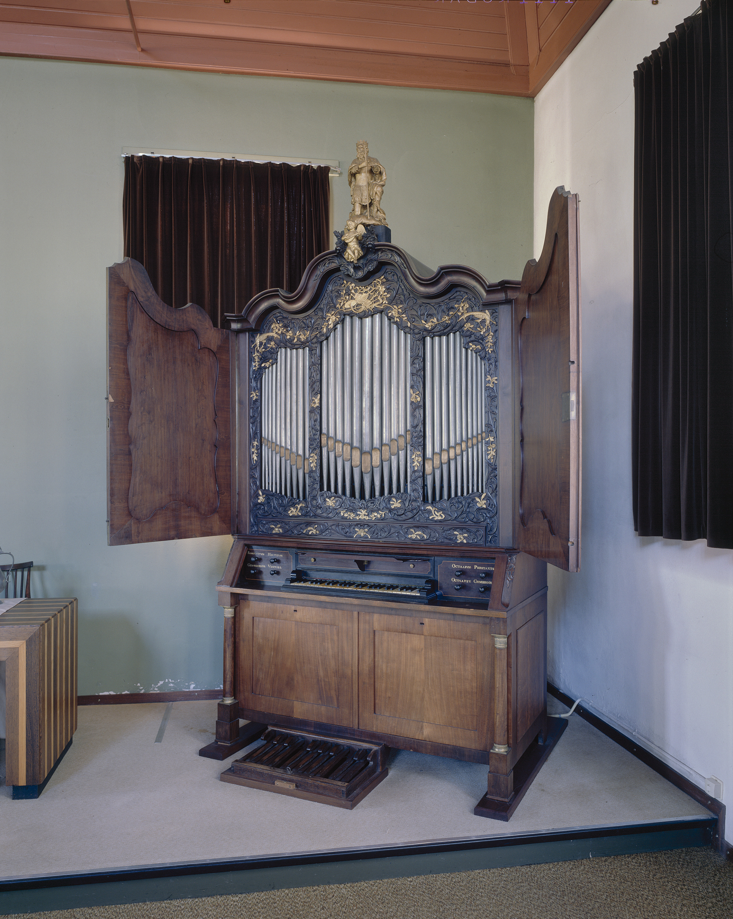 Nederlands Hervormde Kerk: Interieur, aanzicht kabinetorgel, orgelnummer 292 (opmerking: Gefotografeerd voor Het Historische Orgel in Nederland 1726-1769, bladzijder 351)